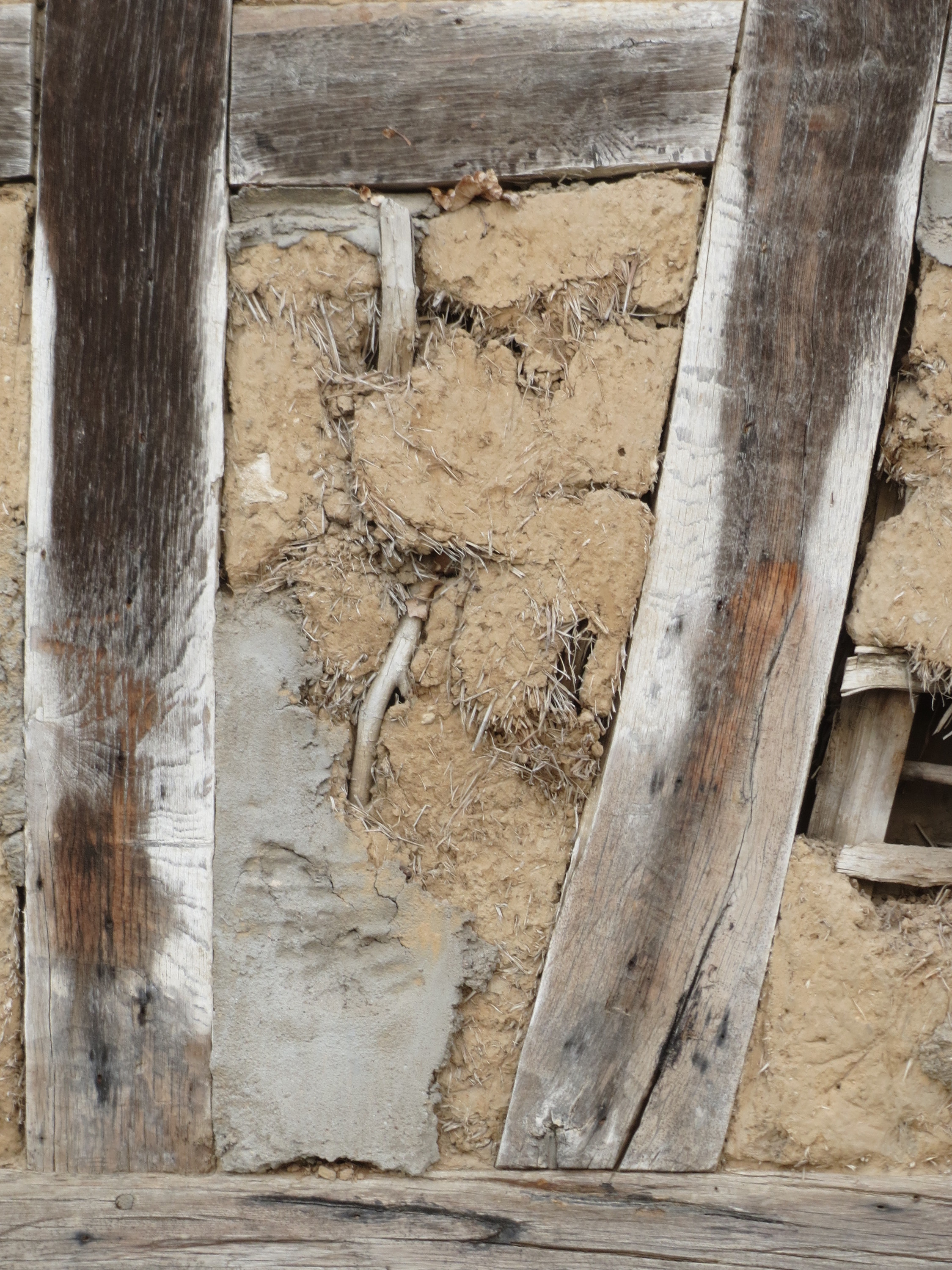 Fachwerk in der Stolberger Straße in Nordenstadt